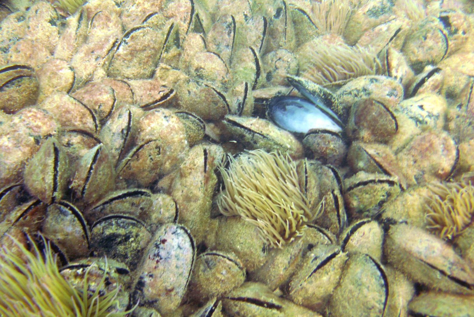 Autore e fonte: Roberto Fogliardi Descrizione: cozze e anemoni sul fondale di Portonovo (Ancona)